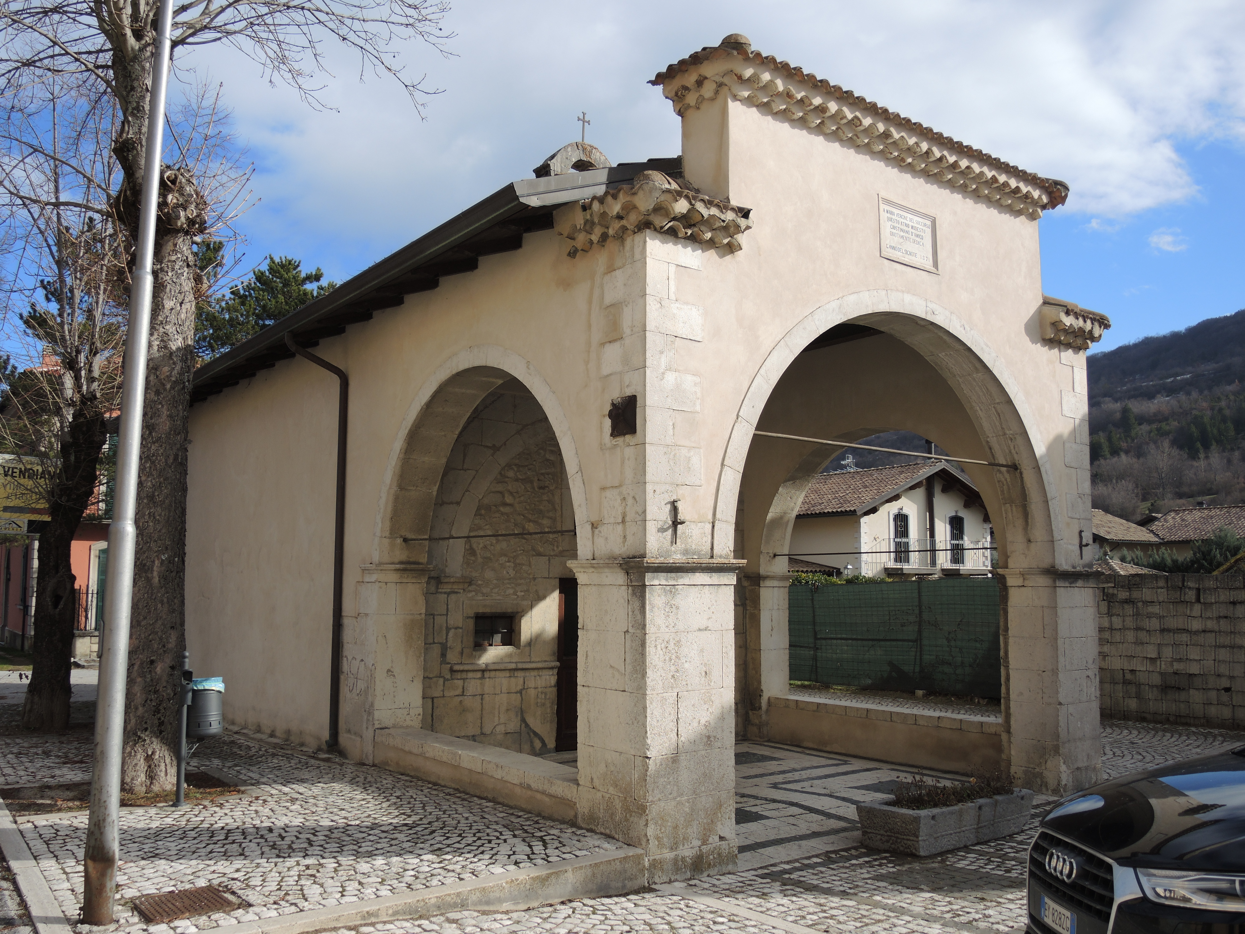 Alfedena: Cappella di Maria Vergine del Soccorso